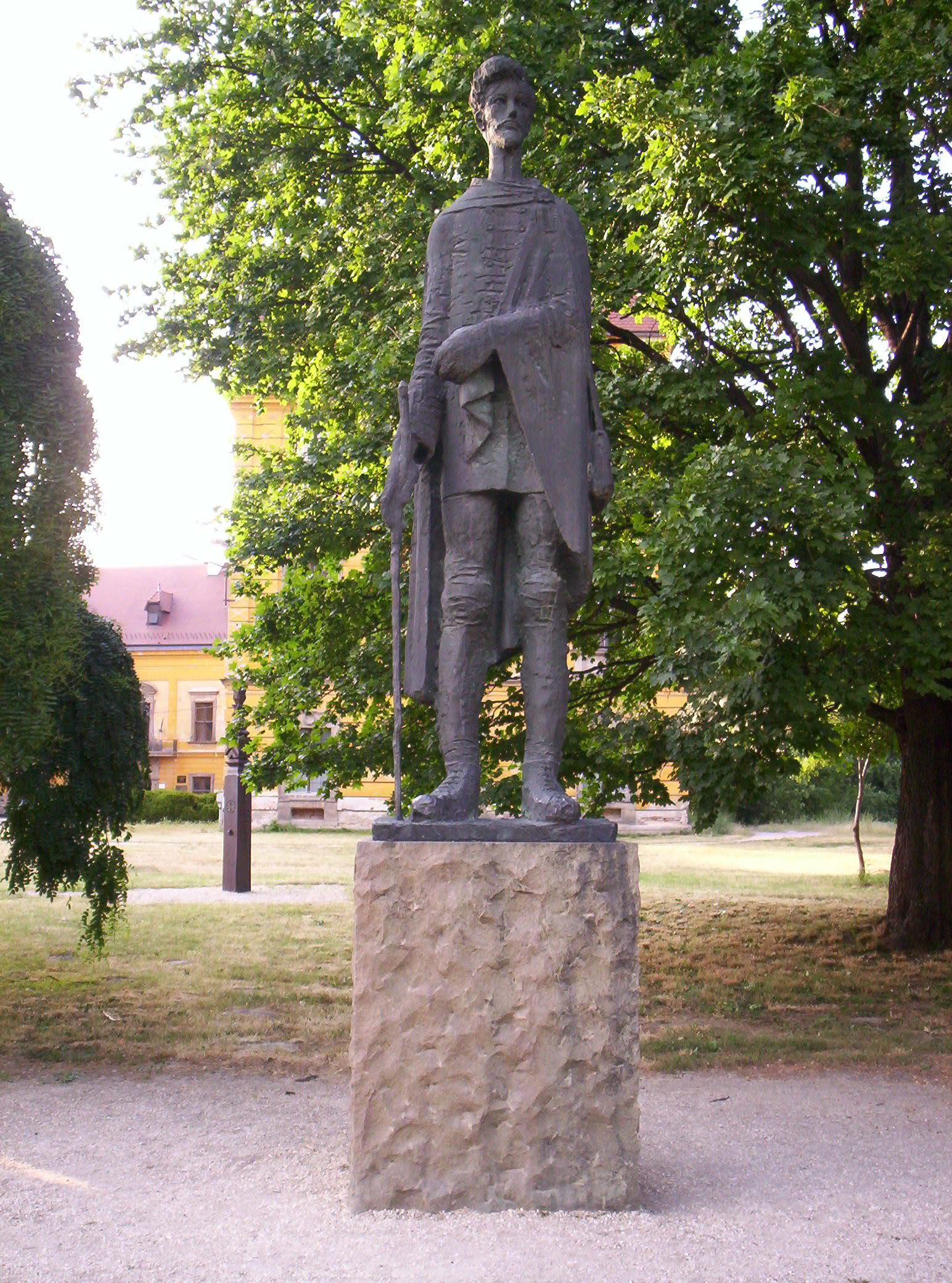 Statue of poet Sándor Petőfi in front of the Esterházy Castle in Pápa, Hungary. Art by József Somogyi, inaugurated on 1973-10-06. Petőfi Sándor szobra a pápai Esterházy-kastély előtt. Somogyi József alkotása, 1973. október 6-án avatták fel.